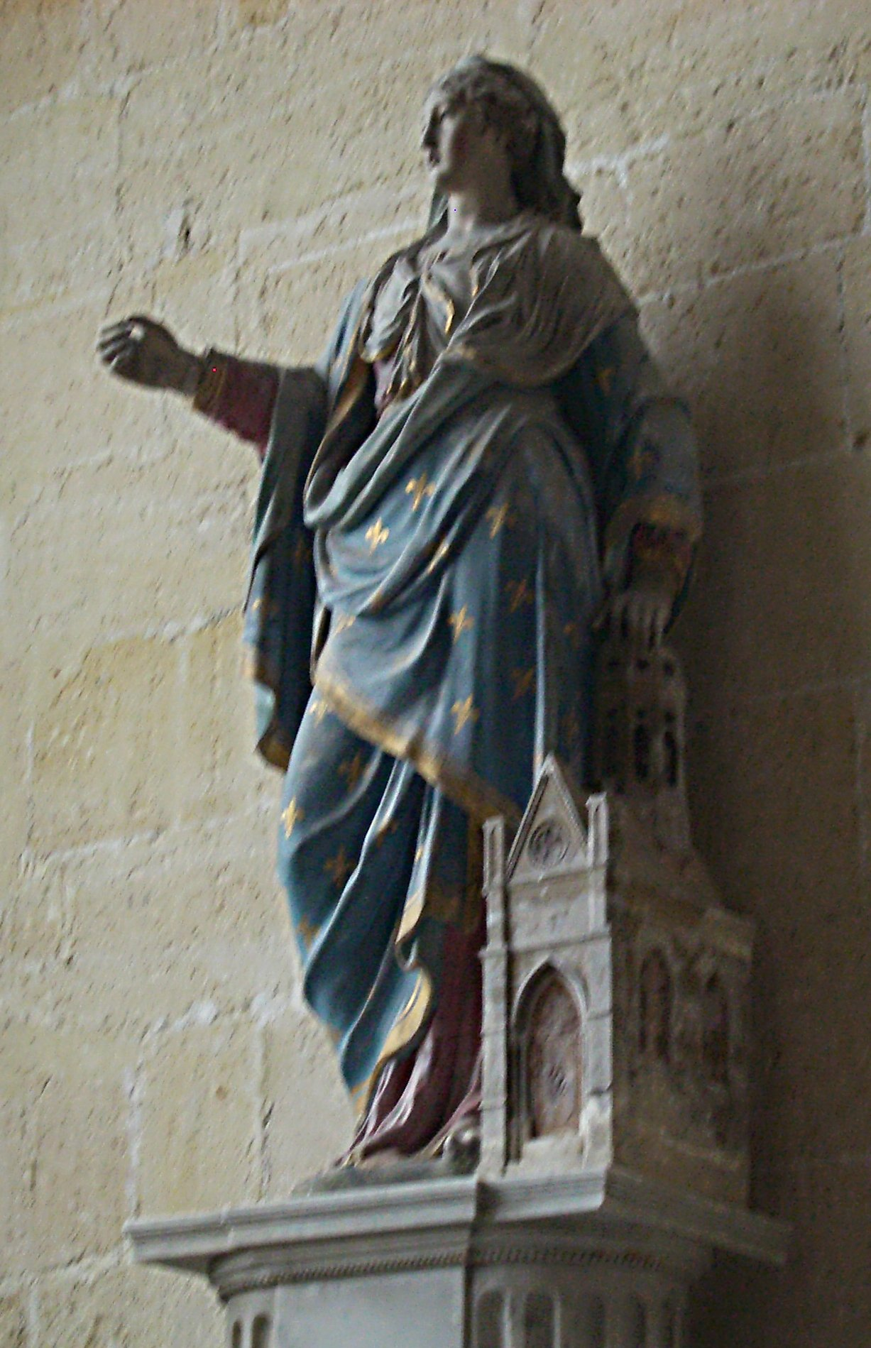 statue de Ste Clotilde dans l'église Notre-Dame des Andelys